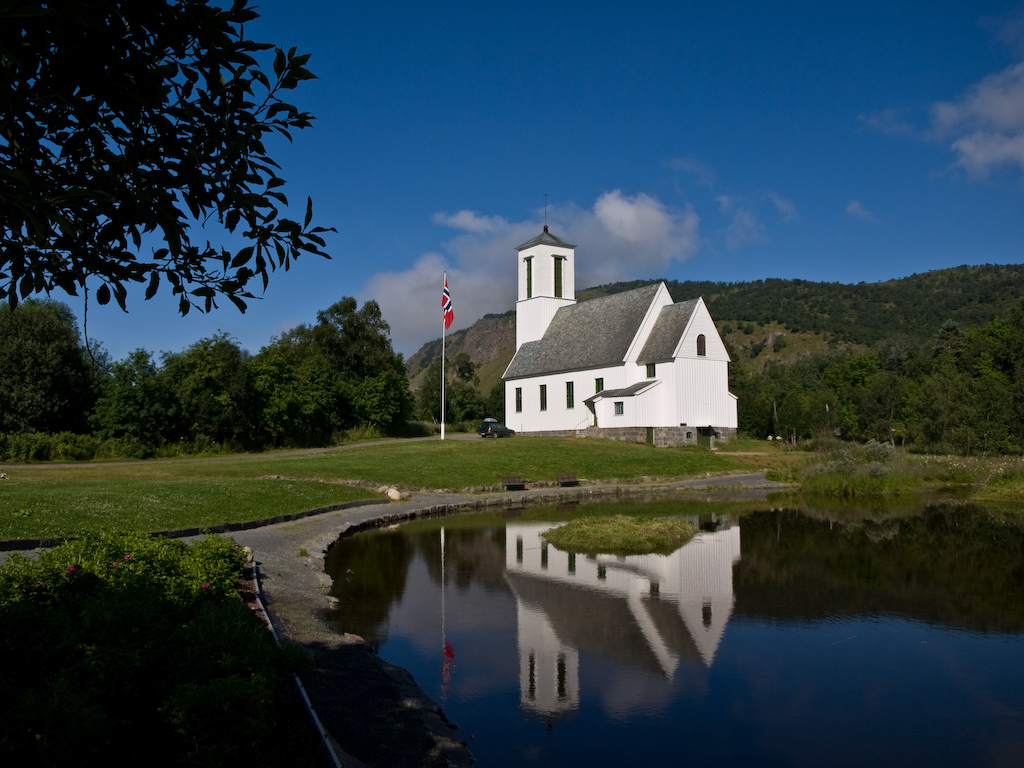 no: Melbu kyrkje en: Melbu church